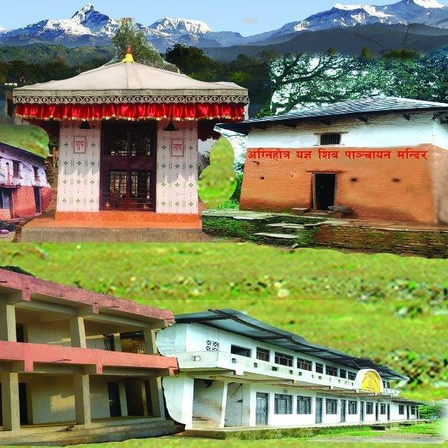 नेपाली: पोखरा चिसाखोला वेद विद्याश्रम को २०६७ साल को तस्बिर